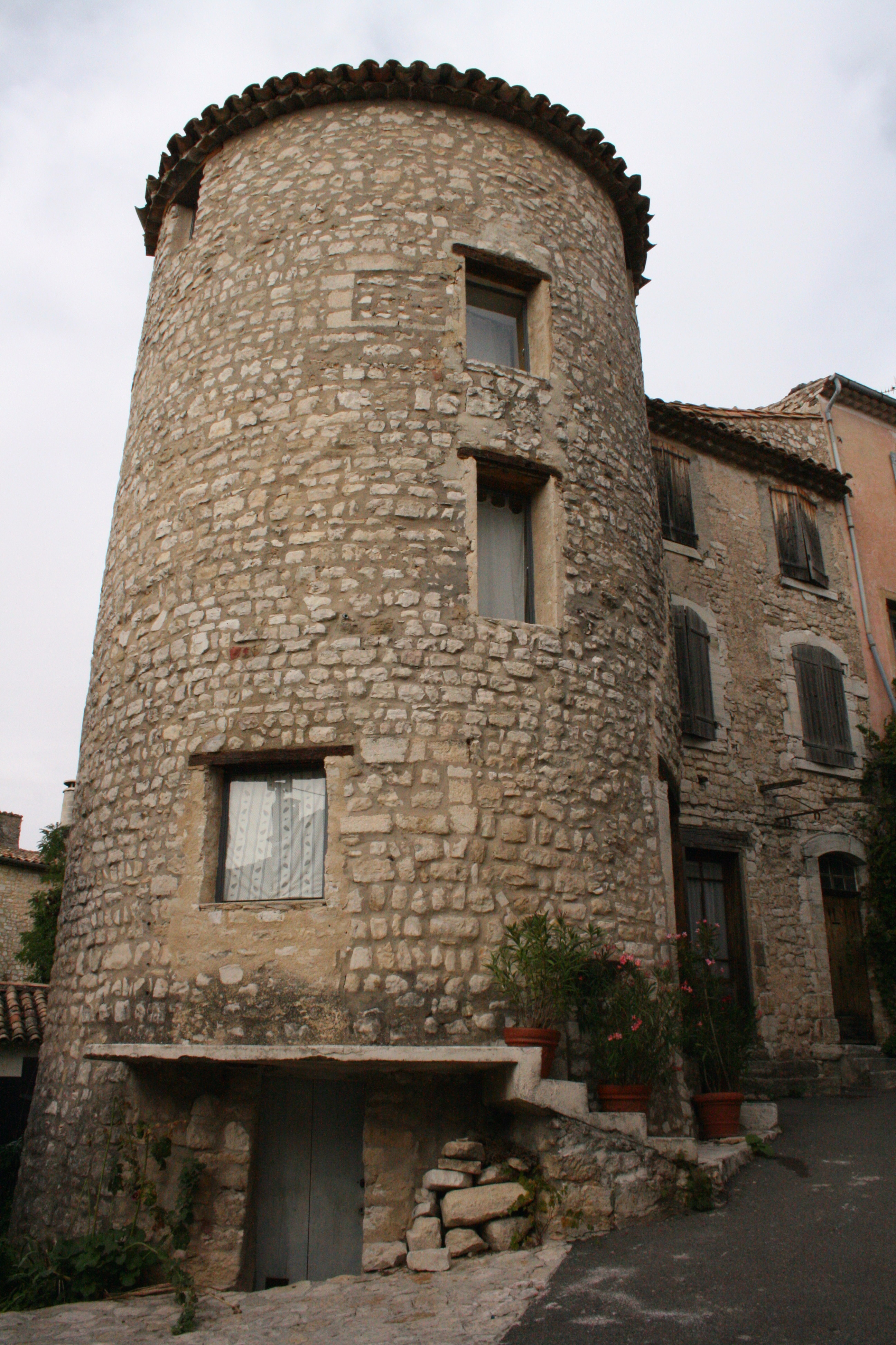 Rue du club, Sault, département du Vaucluse (France). Tour sud-ouest de l'ancien château